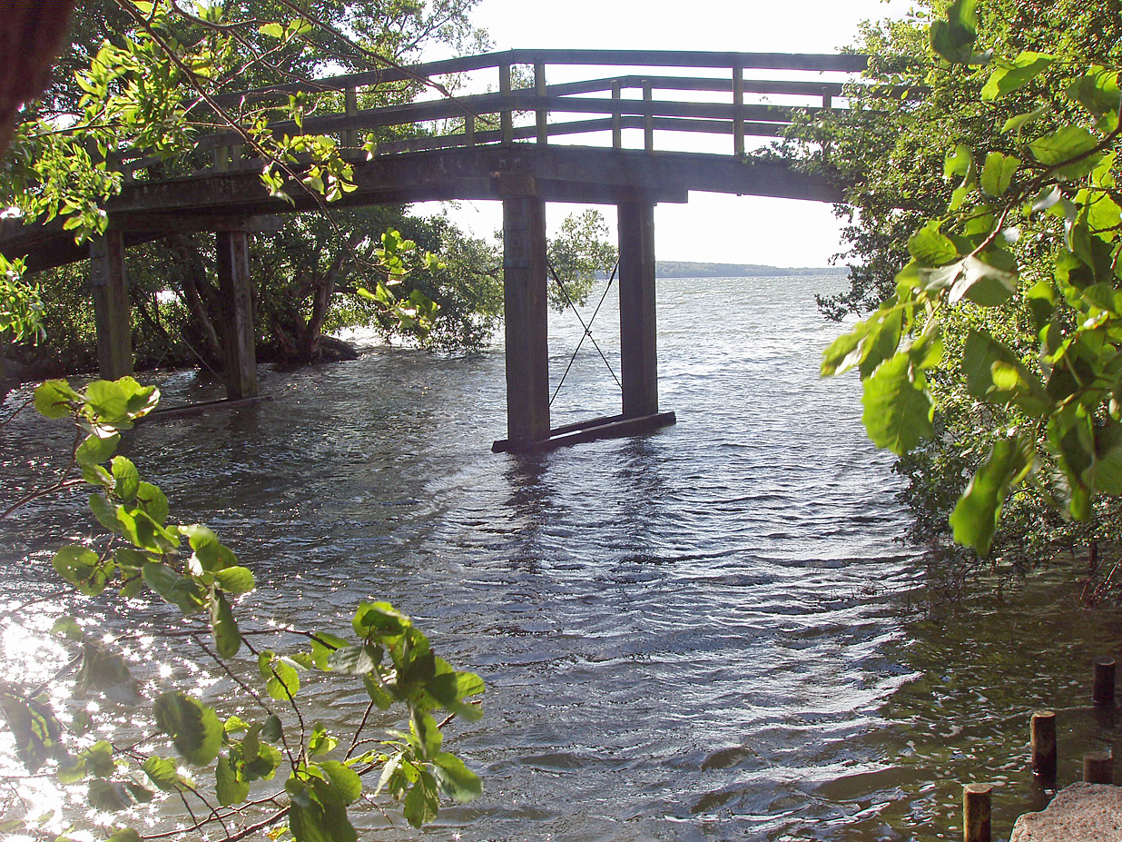 Mølleåen ved Furesøens udløb ved Frederiksdal. Mølleå